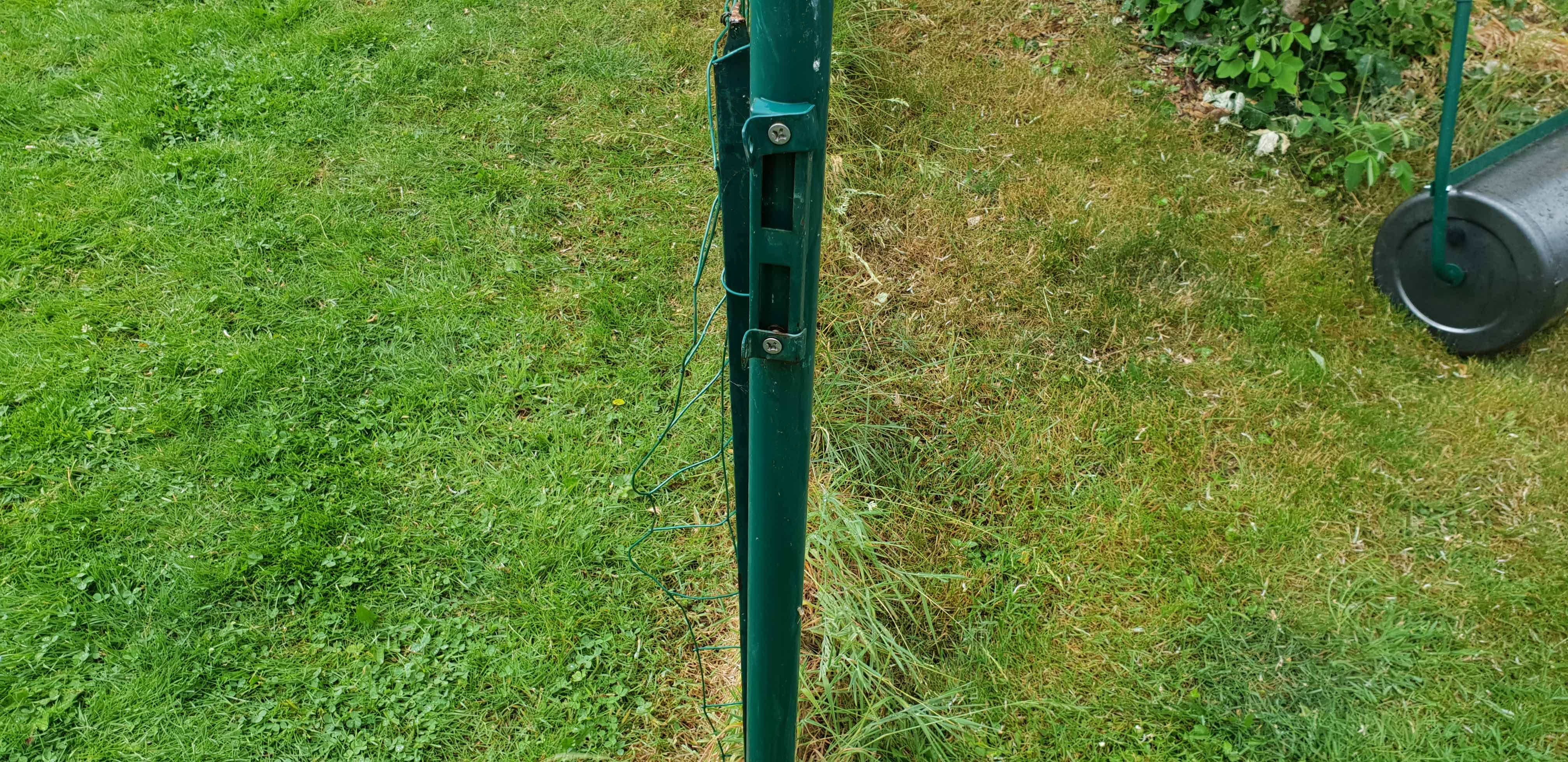 A gauche pelouse scarifiée, à droite non scarifiée encore feutrée (2 mois après la scarification)